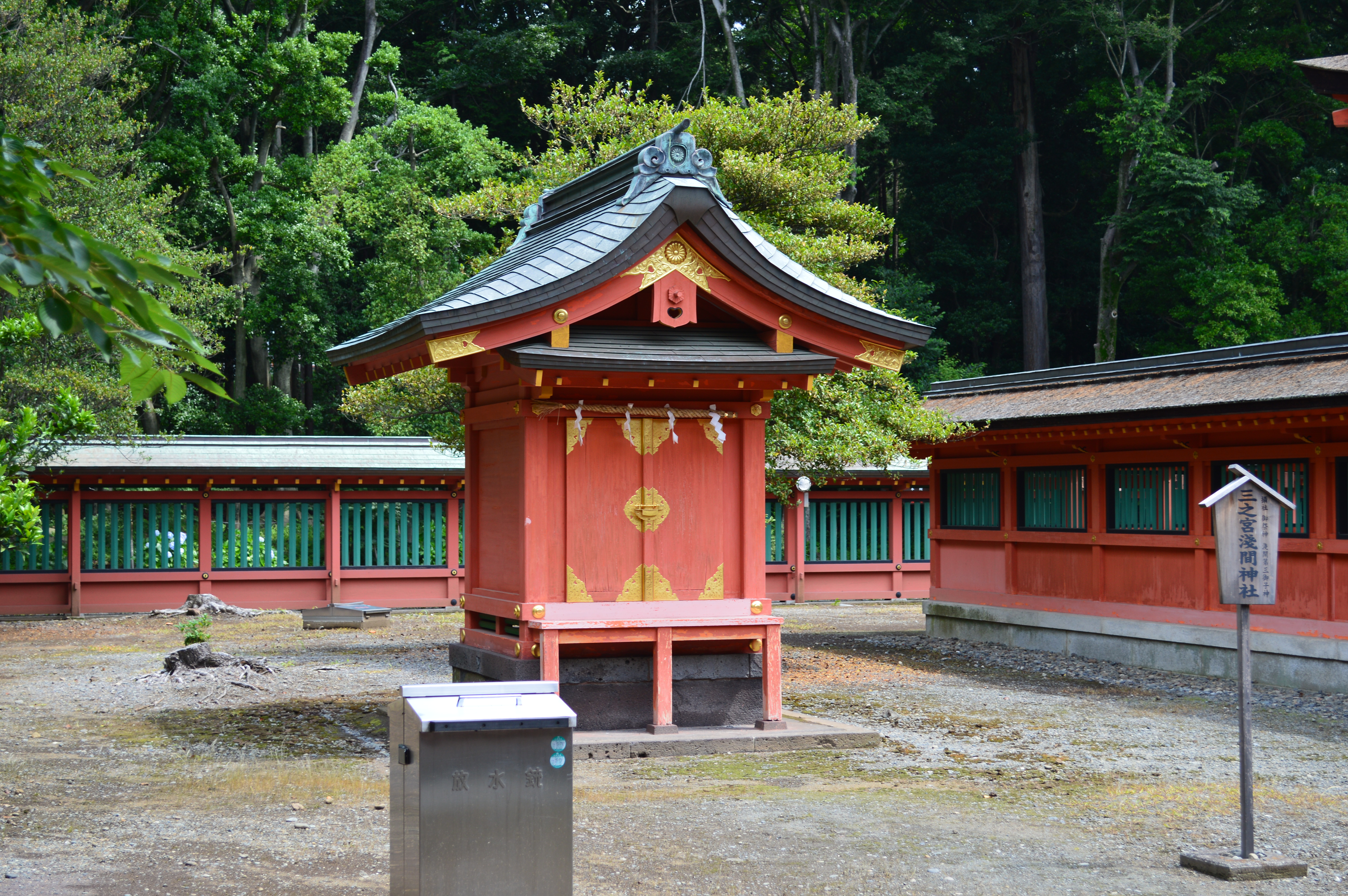 三之宮 (浅間大社境内社)